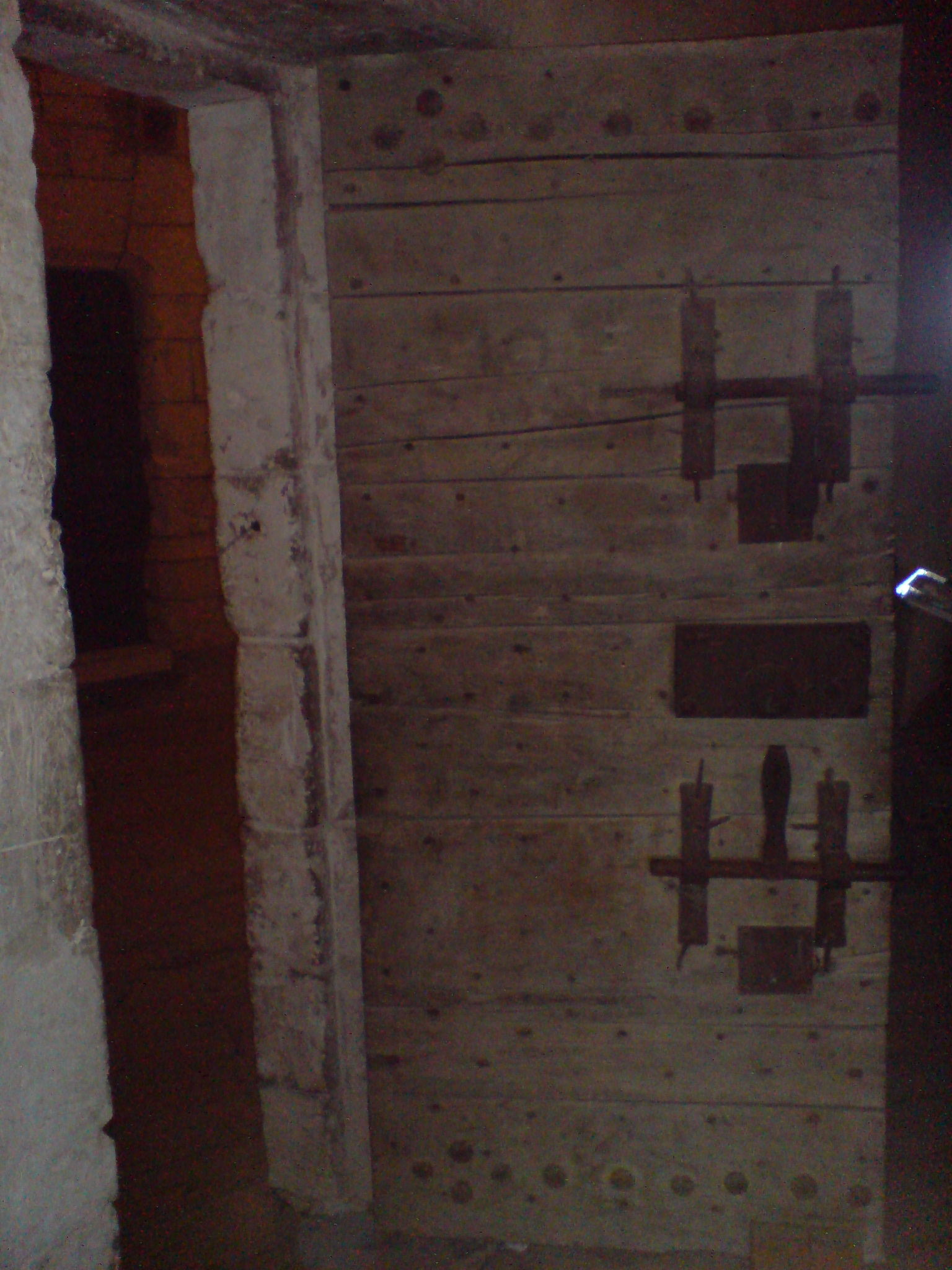 Porte de prison, dans une des tours du port de La Rochelle, France. Date : entre le XVIIe et le XIXe siècle. Ferrures, cloutée